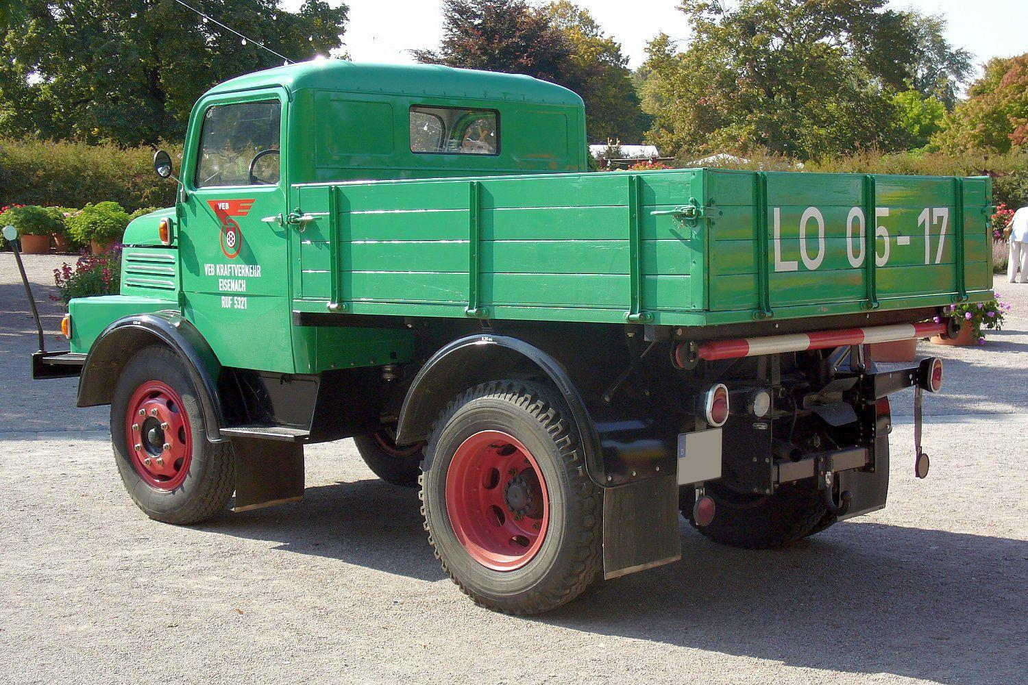 IFA S400 Zugmaschine